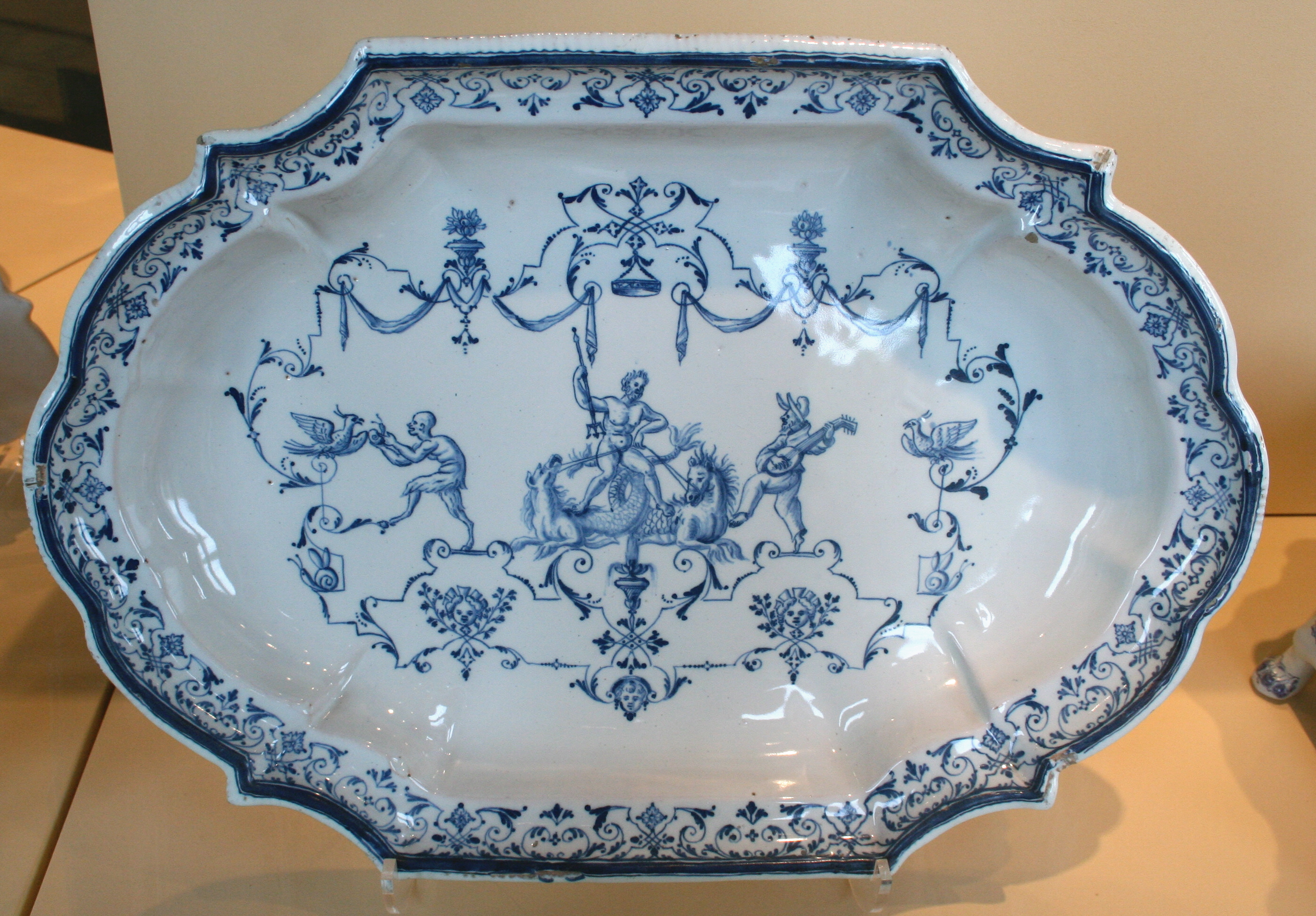 Musée de la faïence à Marseille, plat oblong des ateliers Clérissy à Moustiers, décor grand feu bleu, longueur=43cm largeur=29cm.